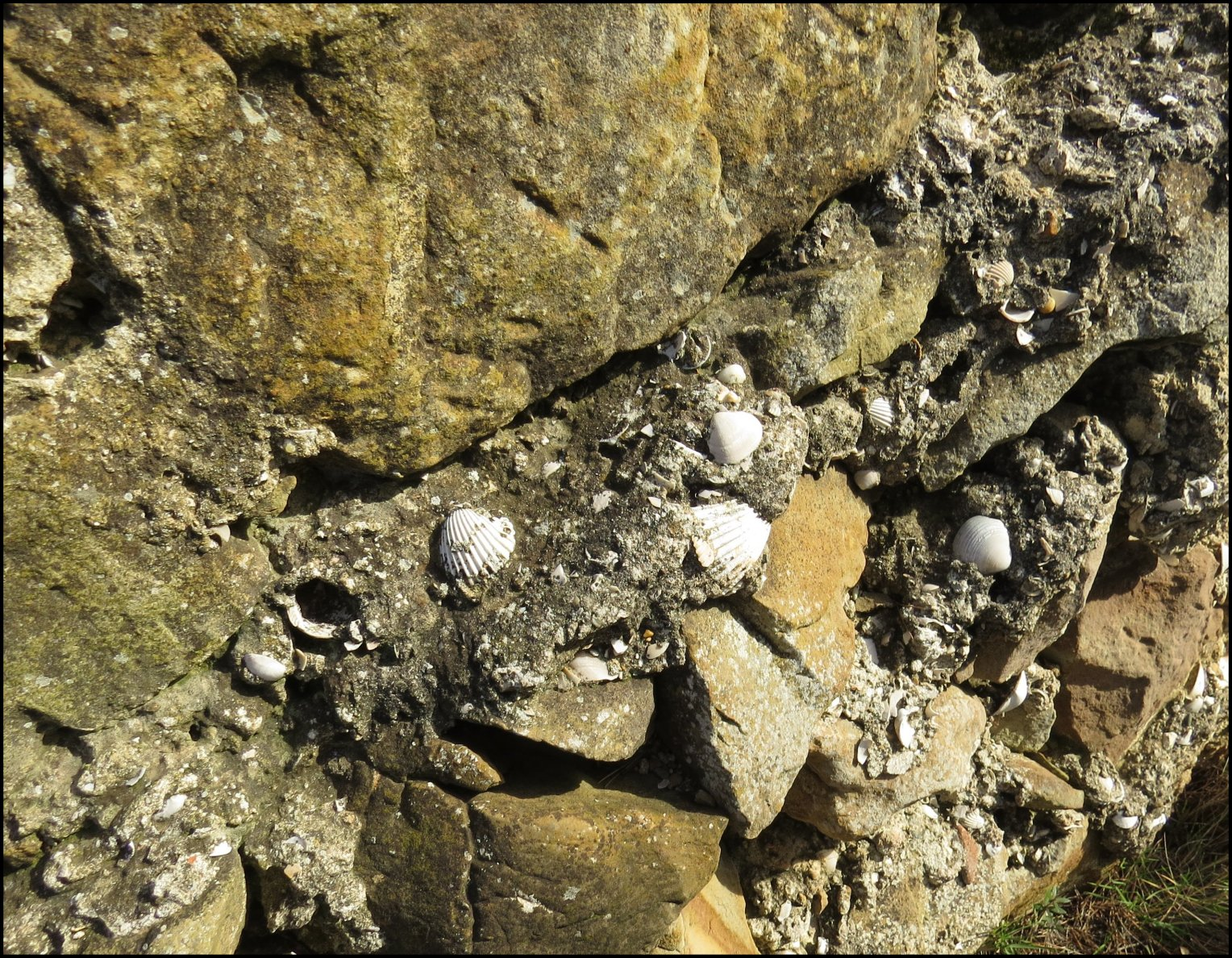 Villa gallo-romaine de Fount de Rome, Fleury d'Aude : coquilles de mollusques marins Cardium (coque) et Tapes (clovisse) incluses dans le mortier des murs.